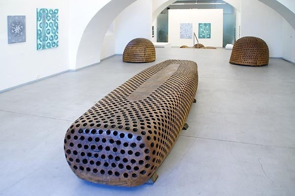 Prostory Galerie Caesar Olomouc